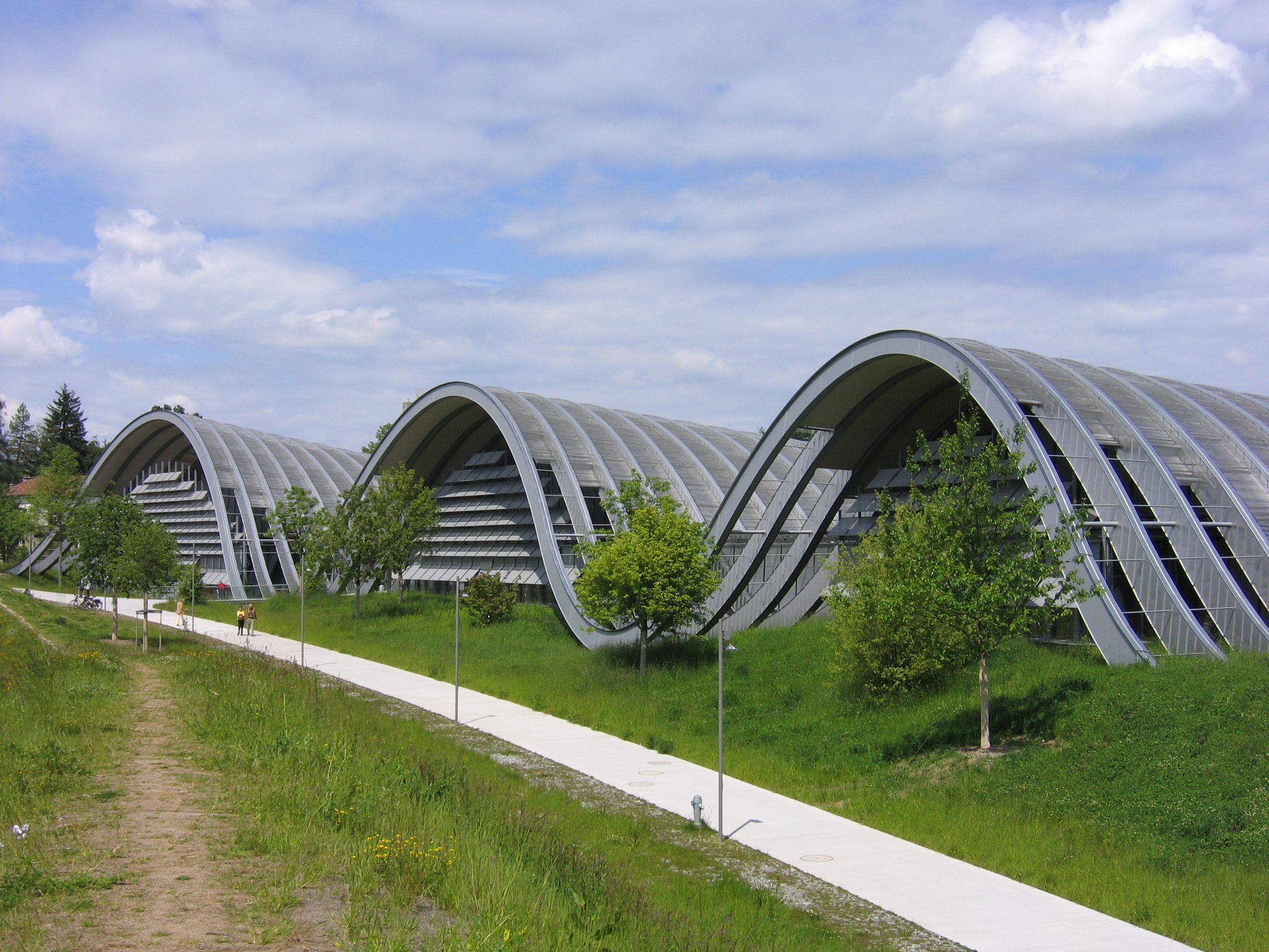 Zentrum Paul Klee, Bern. Architekt: Renzo Piano.